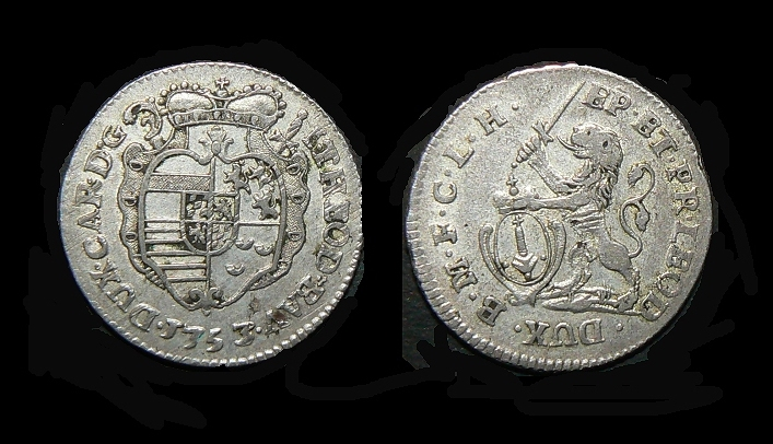 Monnaie liégeoise d'argent de Jean Théodore de Bavière. Double escalin. Chestret 684. Jean Théodore de Bavière fut le dernier Prince Evêque de Liège à battre monnaie. La fin de 750 ans de monnayage liégeois.